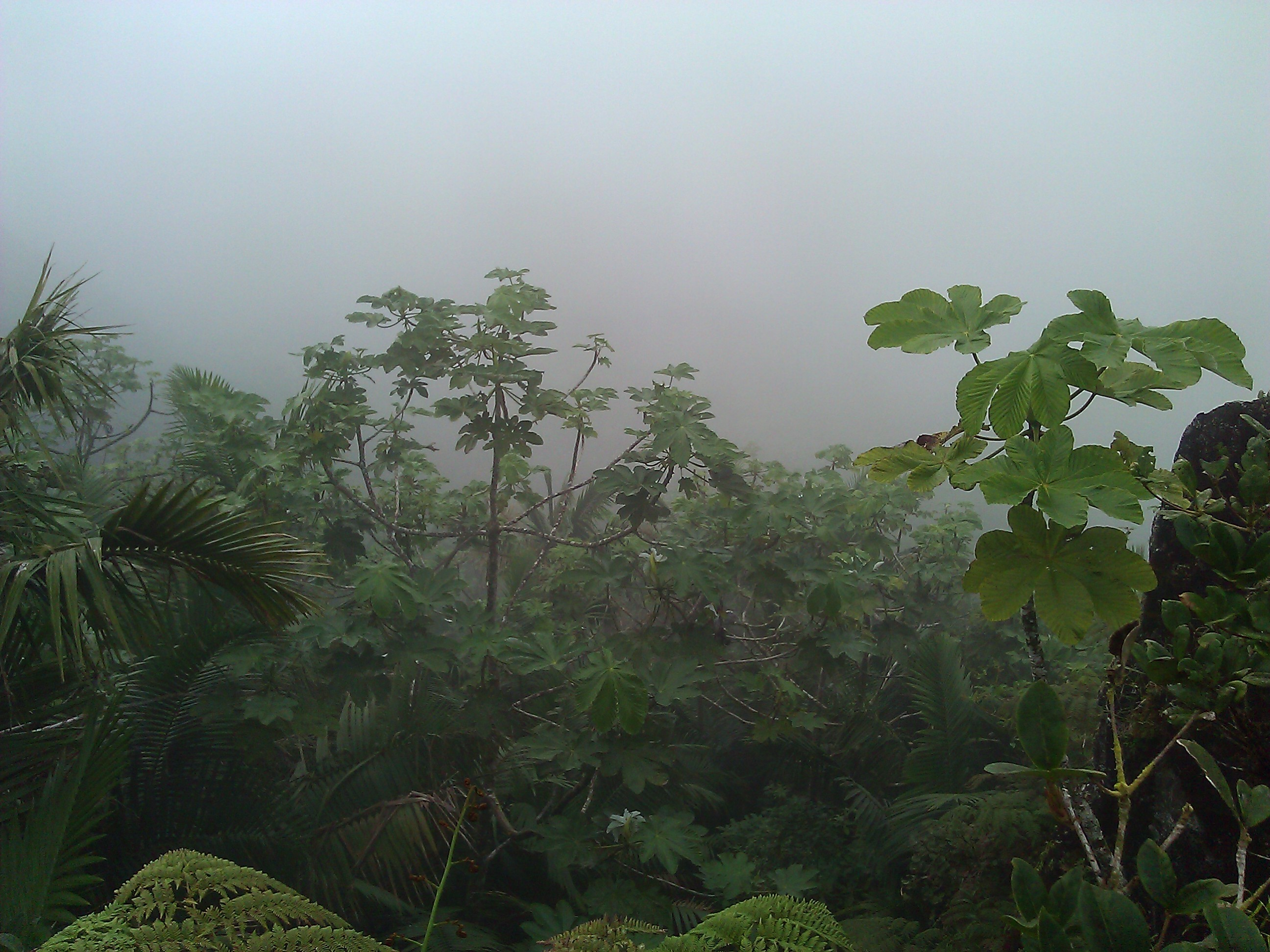 Jiménez, Río Grande 00745, Puerto Rico